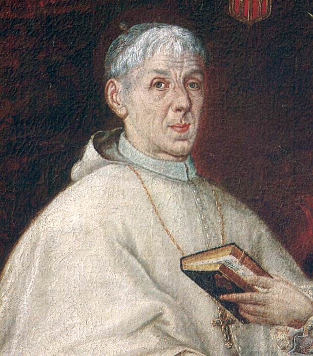 Retrato de Francisco Gutiérrez Galeano (1670-1748), obispo de Huamanga